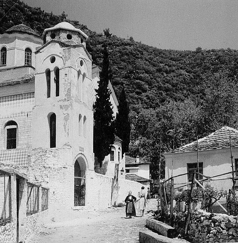 Marienkirche (1957)